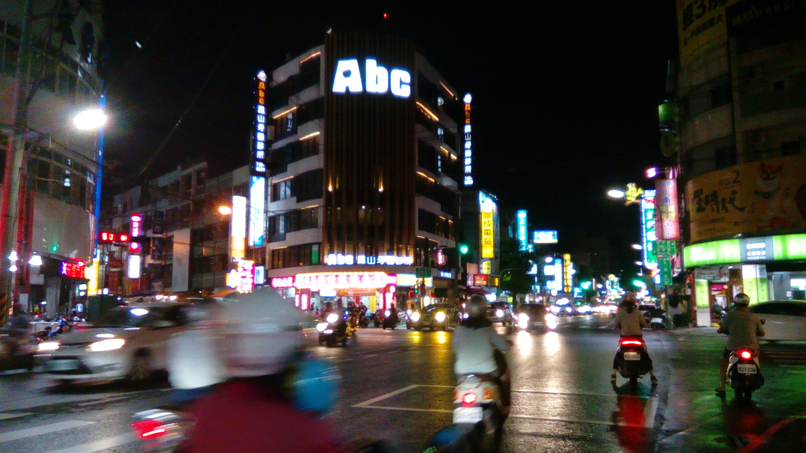 光遠路與精武路口